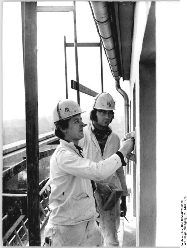 Bauarbeiter Fassade verputzend ADN-ZB Kluge 28.3.74-wa Bez. Leipzig: In eine 2, 5 - Zimmer-Wohnung mit Bad, Küche und Etagenheizung in Altenburg wird die Familie Wendt einziehen. Gemeinsam mit seinen Arbeitskollegen ist Hans-Jürgen Wendt dabei, sich einen ehemaligen Wäscheboden auszubauen. Roland Matthes ( vorn) und Manfred Bauch verputzen die Ausenwand.